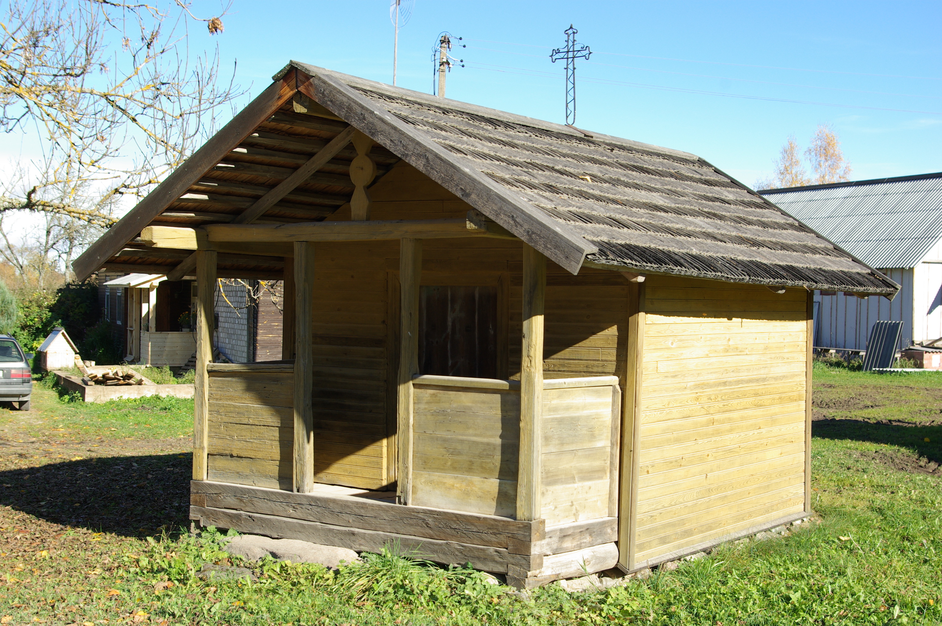 Uusvada tsässon